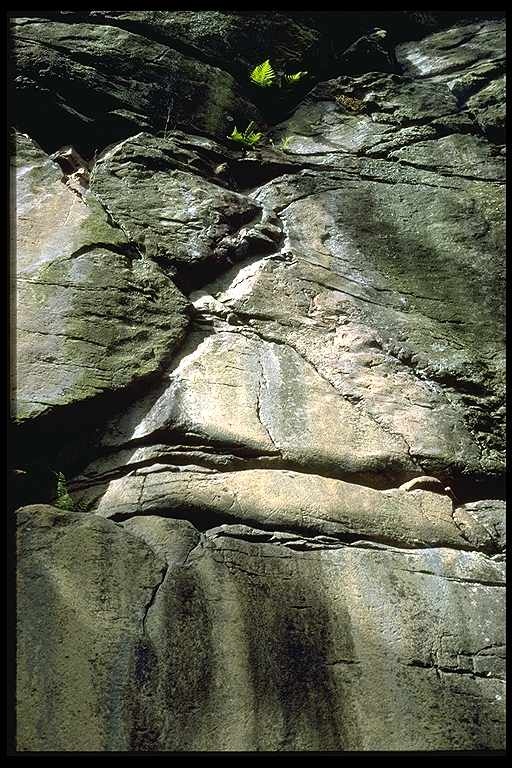 Motiv: Bo Allestorp Kategori: Hällmålning . Bo Allestorp.